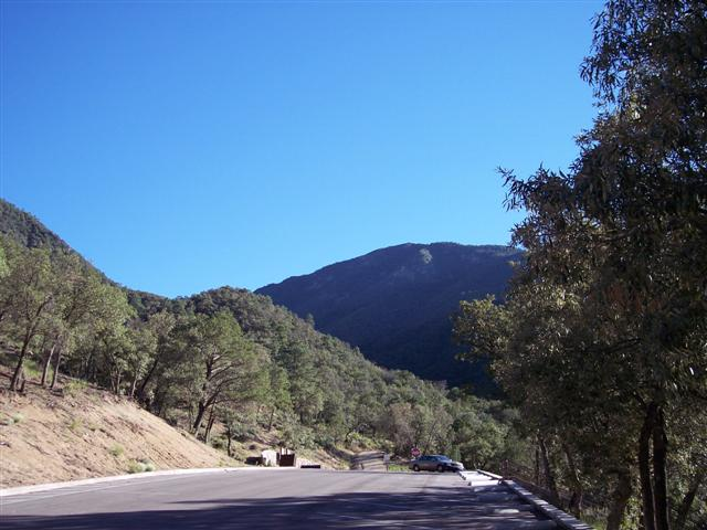 Madera Canyon near Tucson, Arizona